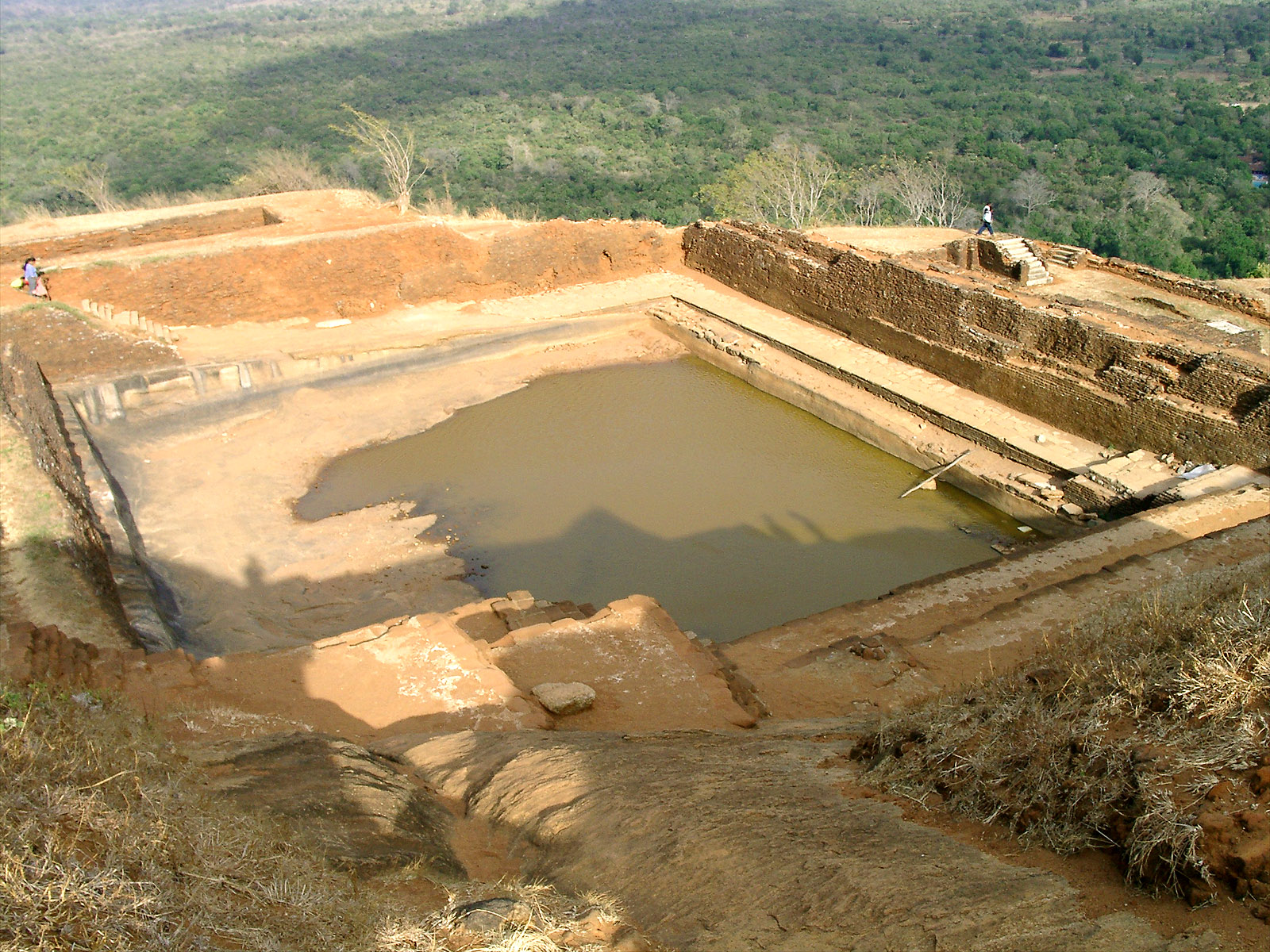 Ruin in Sigiriya in Sri Lanka